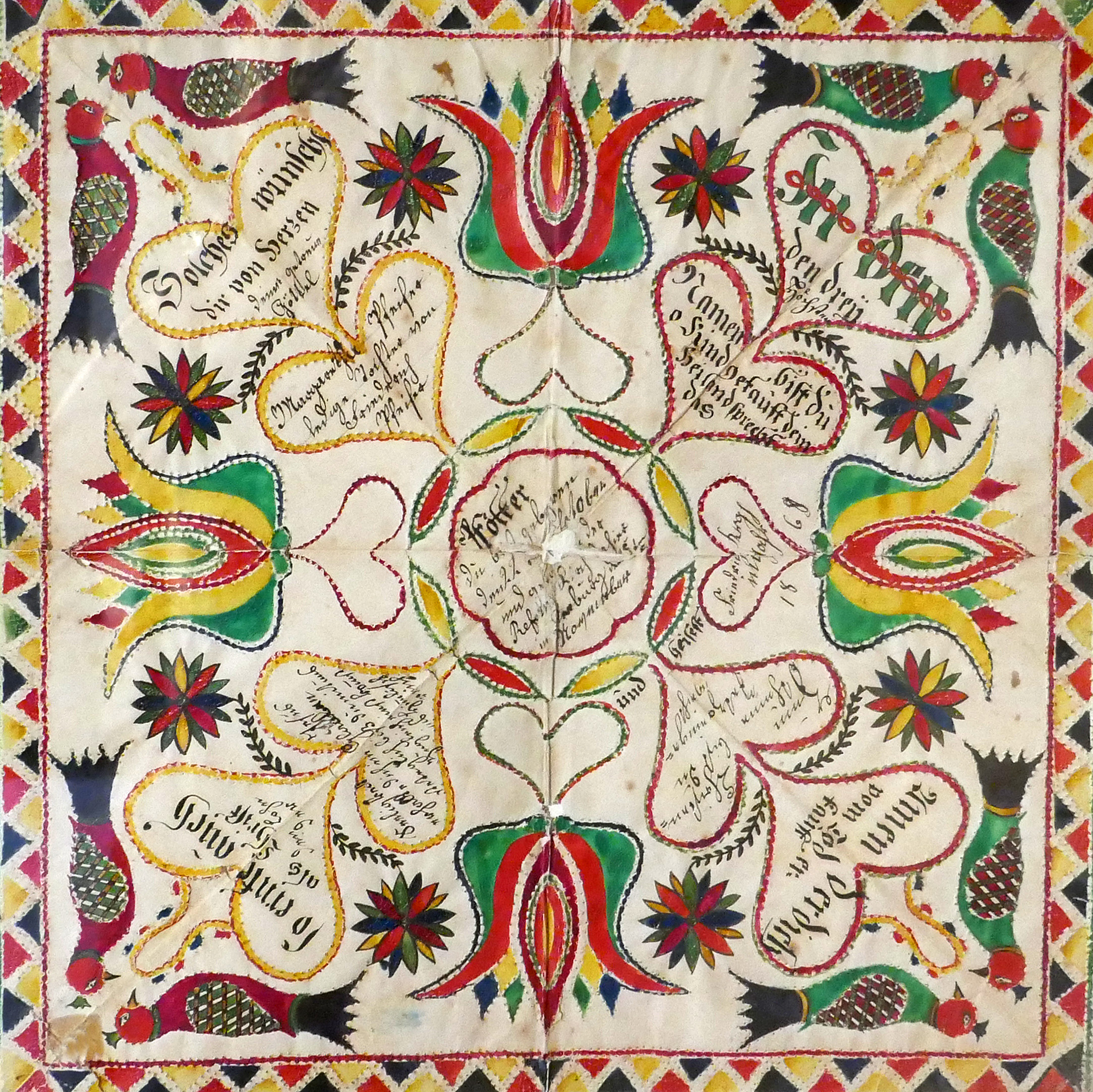 Lettre de baptême ajourée à l'aide d'un canif (canivet), puis écrite et peinte. Cleebourg, église réformée, 1868. Exposition Vies protestantes : le mot et l'image au Musée alsacien de Strasbourg (2017).